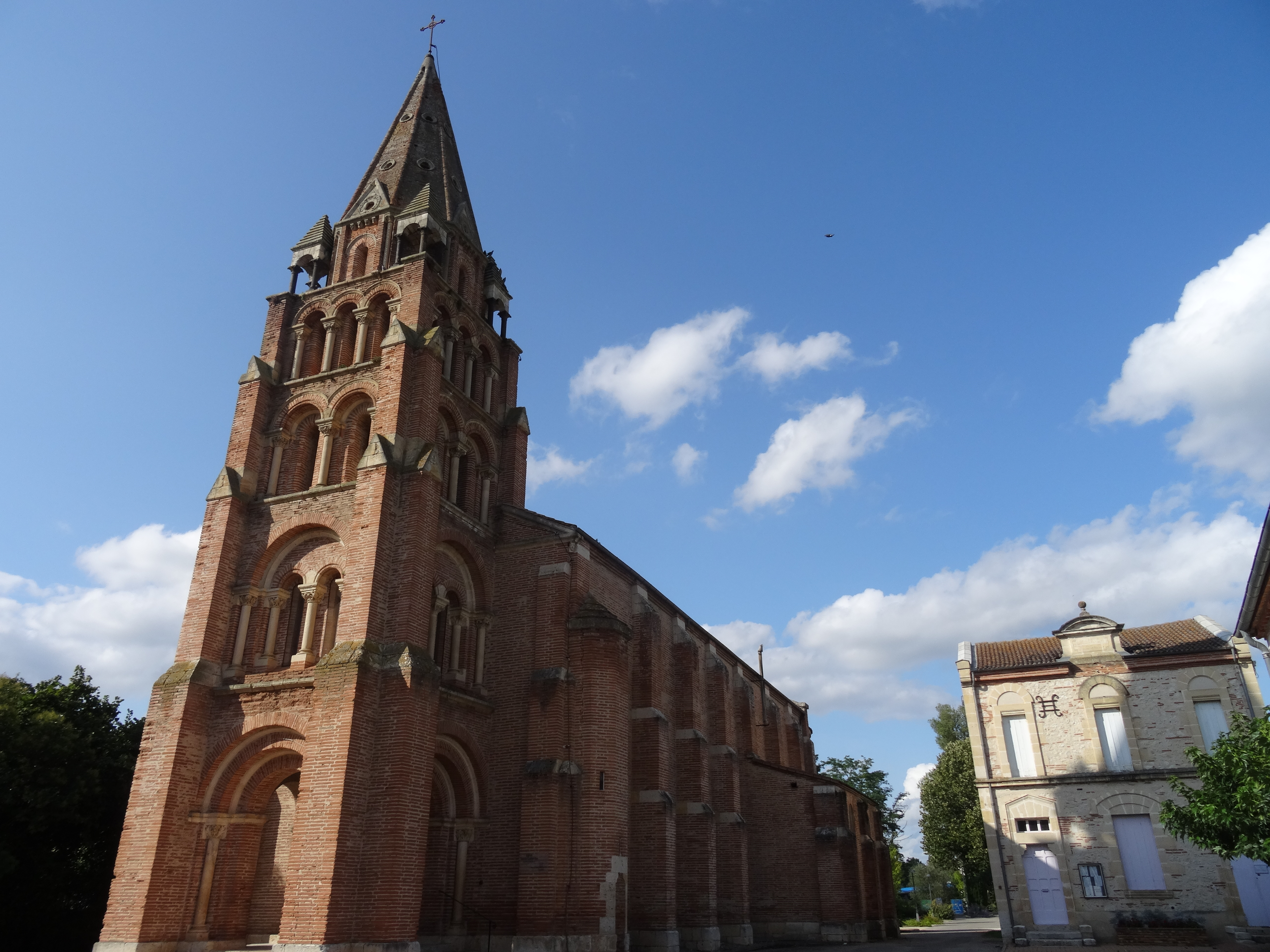 Eglise Sainte-Catherine - Sauveterre Saint-Denis (47)